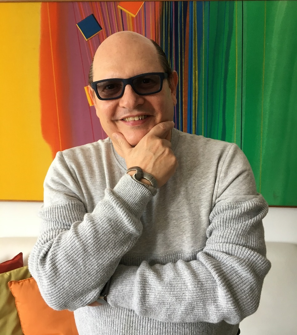 Doc Comparato é considerado um dos principais roteiristas de cinema, televisão e teatro do Brasil